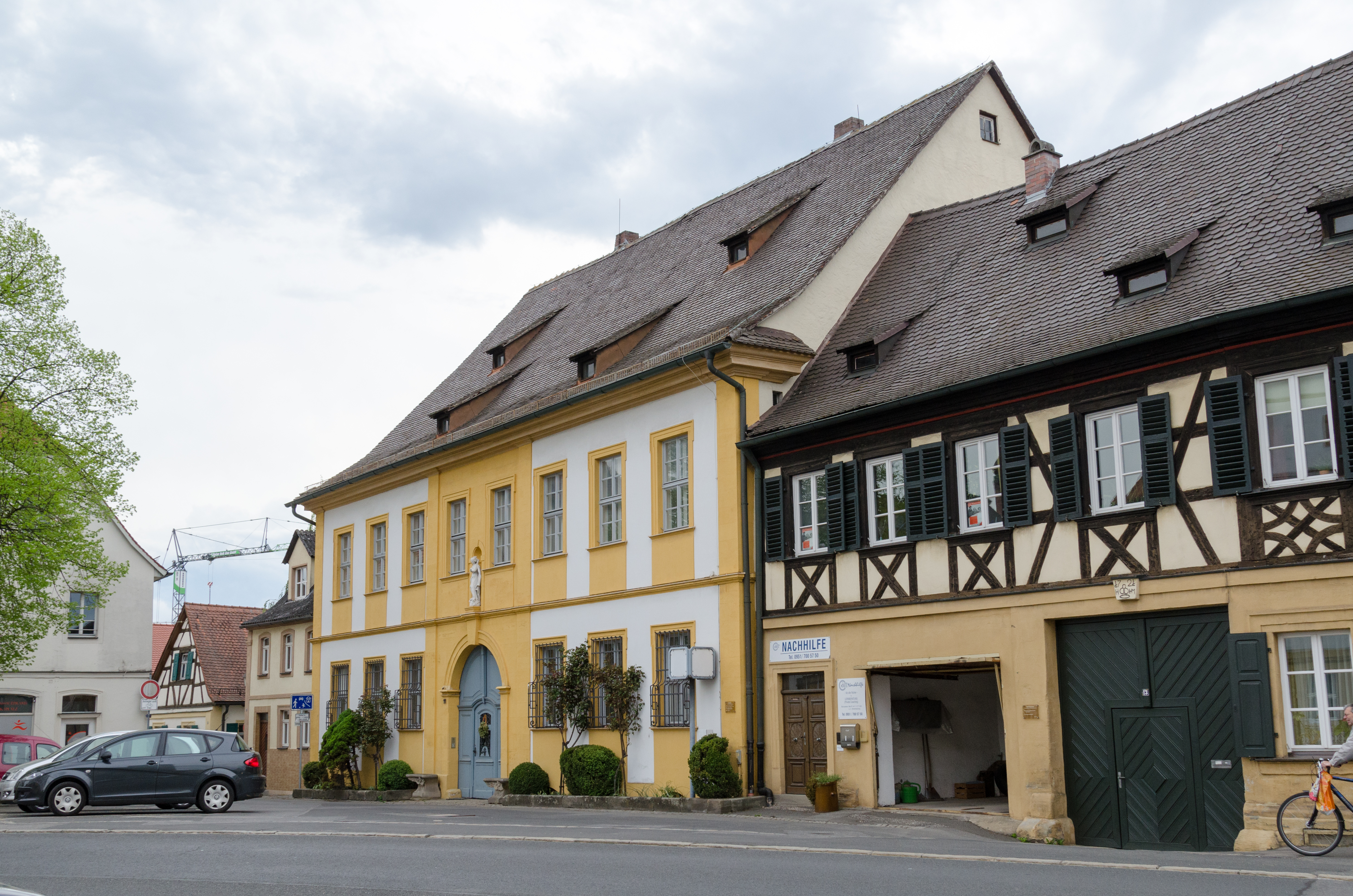 Hallstadt, Marktplatz 11